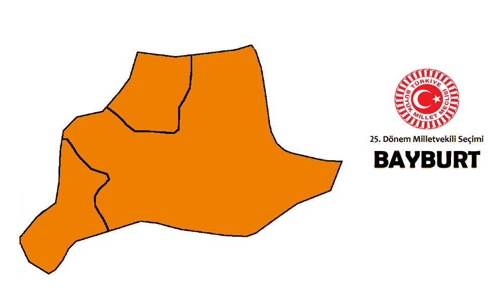 2015 genel seçim sonuçları